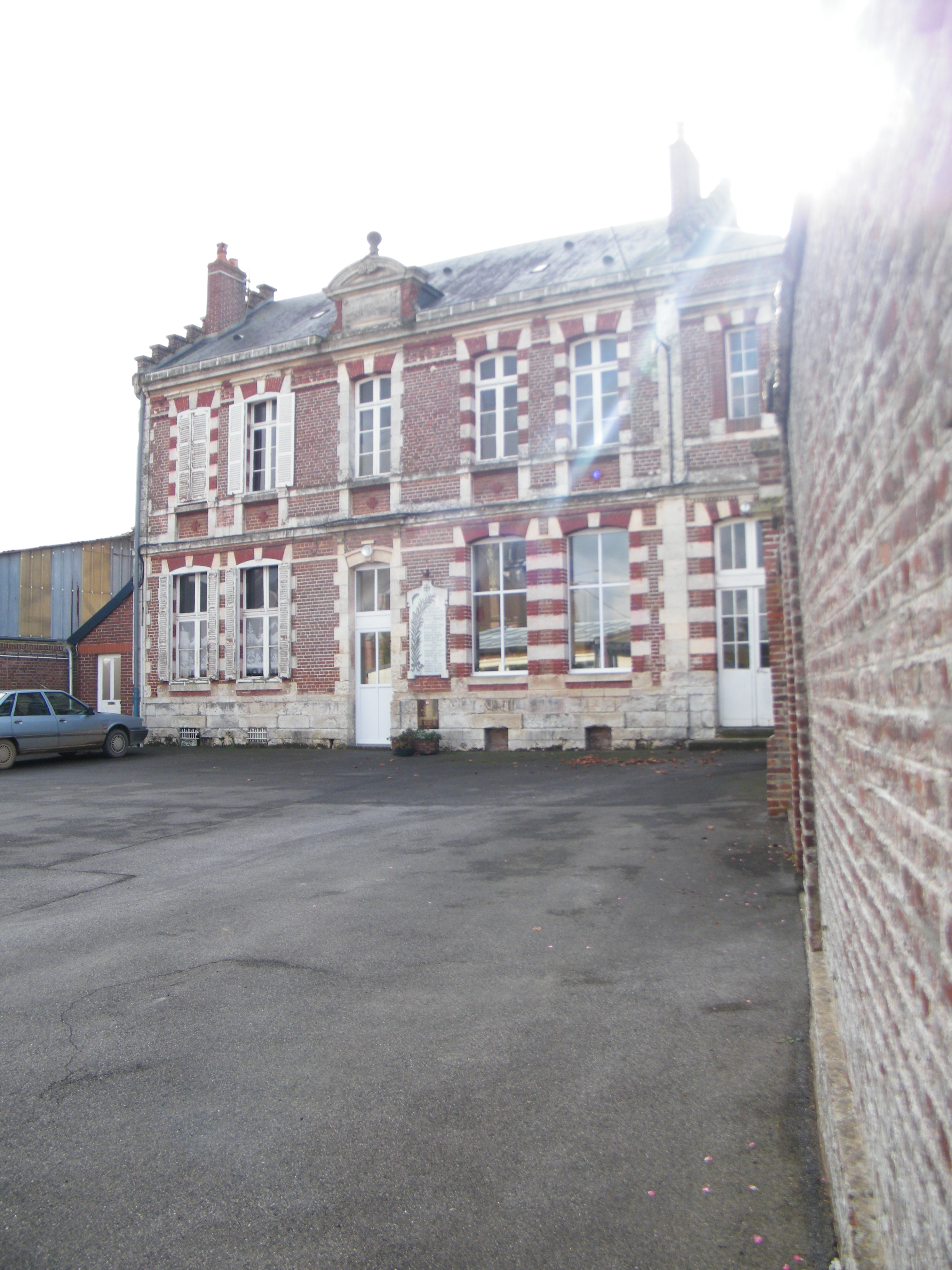 Mairie-école.